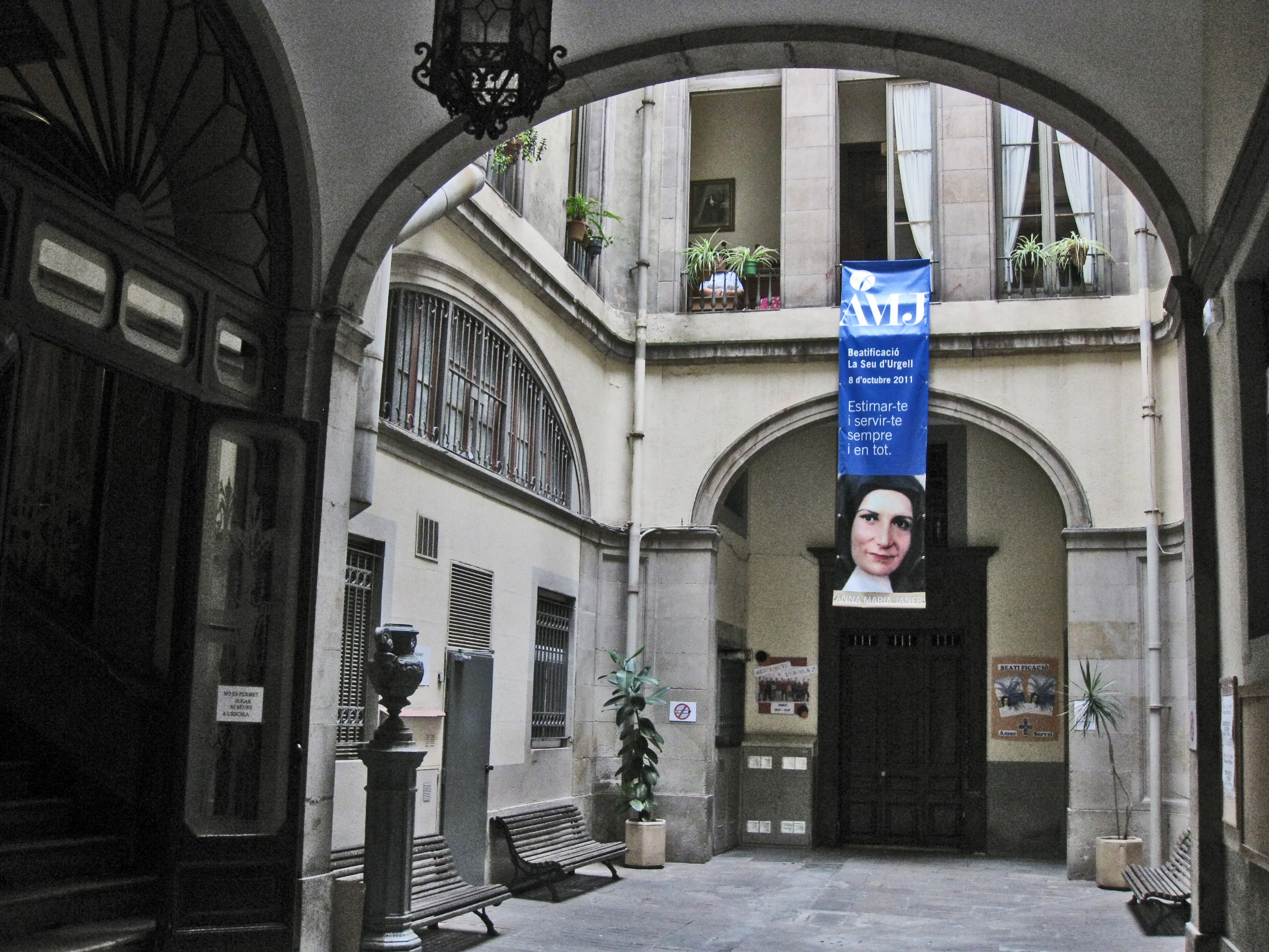 Edifici de l'inici del segle XIX situat al carrer d'Avinyó núm. 20, al barri Gòtic de Barcelona. Avui acull el Col·legi de les Germanes de la Sagrada Família d'Urgell. Vista del pati, amb la commemoració de la beatificació de la germana Anna Maria Janer, fundadora de la congregació.